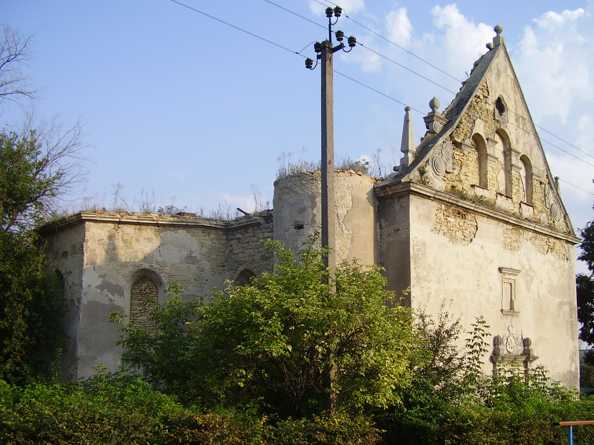 Домініканський костел (мур.), смт. Чернелиця